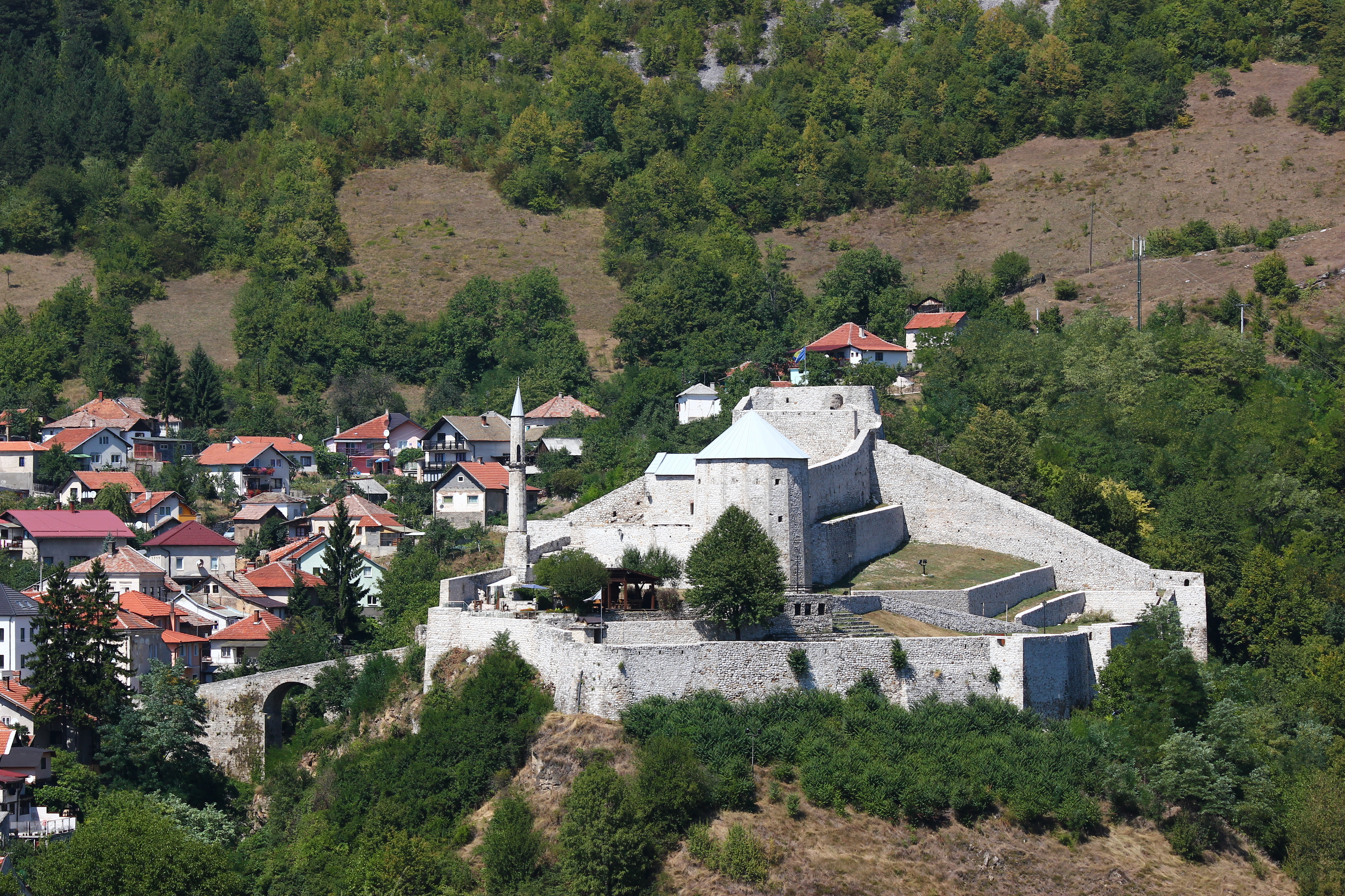 Die Festung von Travnik.